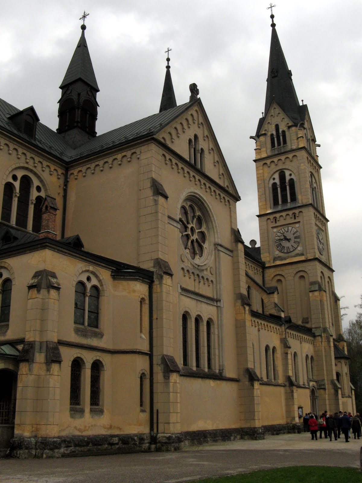 Brestanica-bazilika Lurške Matere Božje